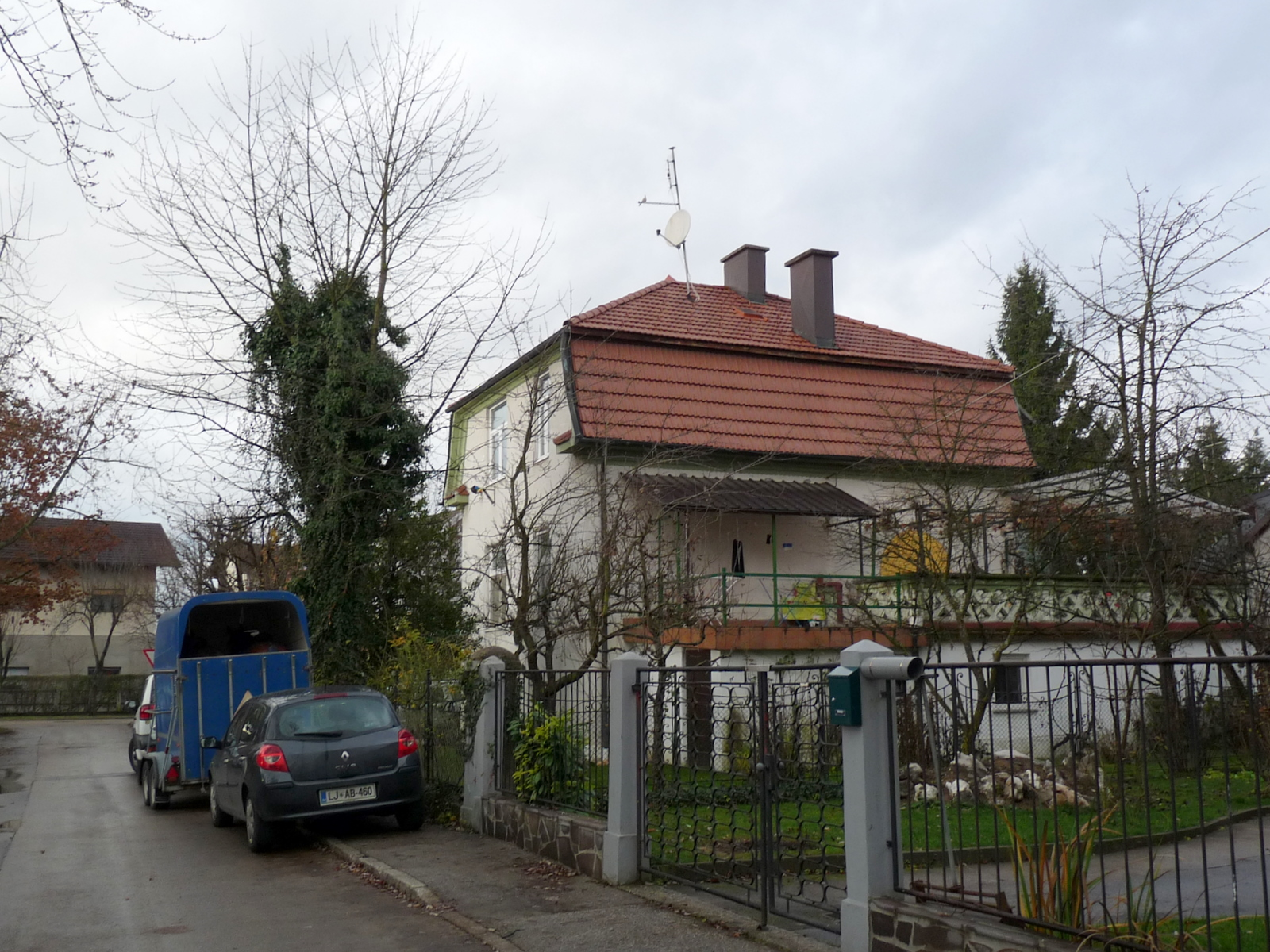 Valjavčeva 20 v Ljubljani (obenem tudi bivališče Vitomila Zupana), kjer je med drugo svetovno vojno deloval radio Kričač.